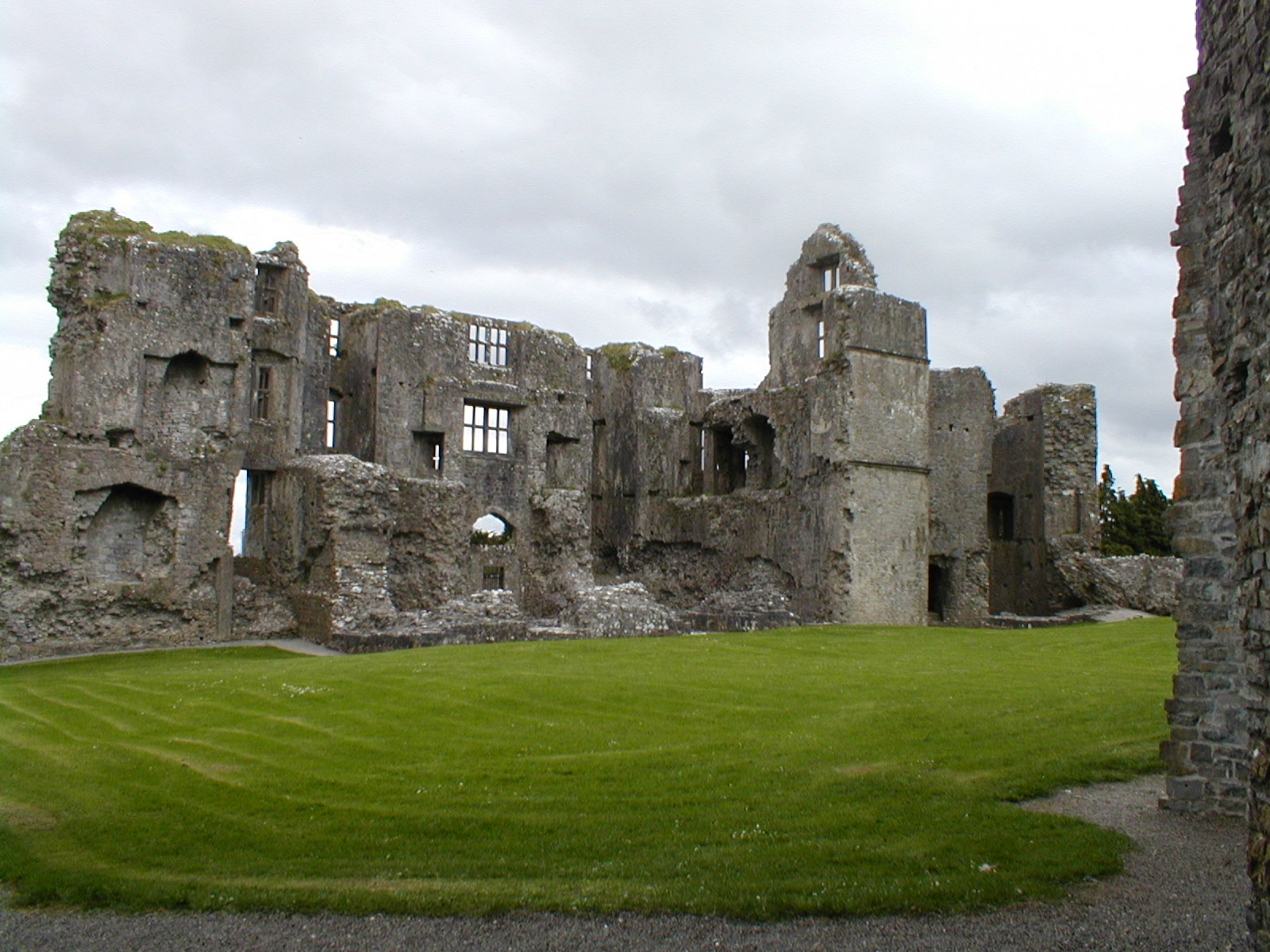 Innenhof Roscommon Castle